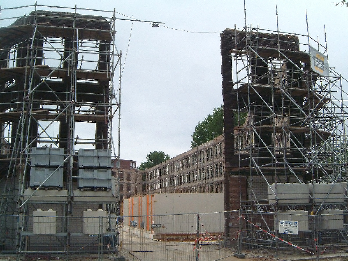 Facadism on the Noordereiland in Rotterdam